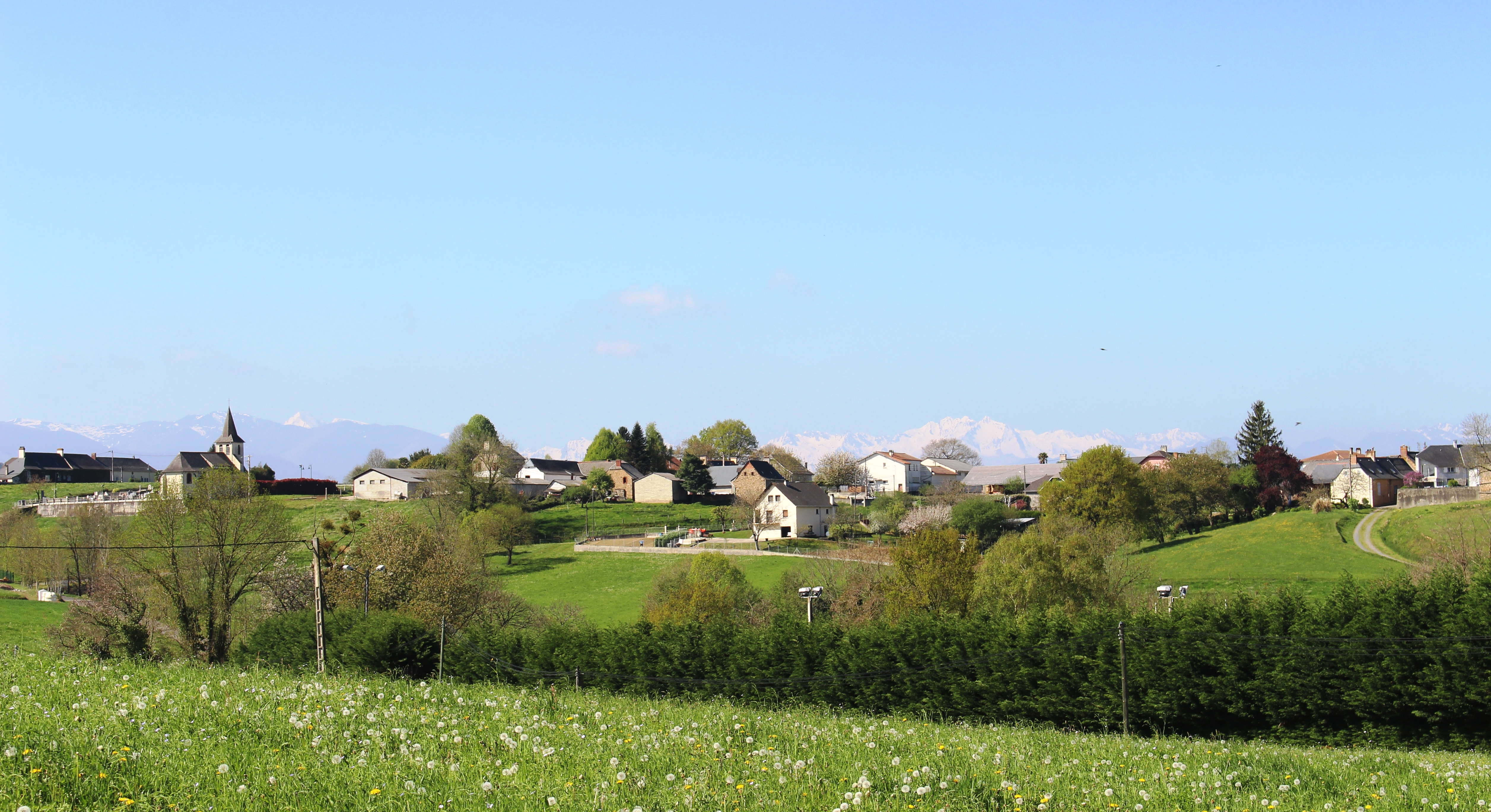 Hitte (Hautes-Pyrénées)